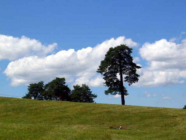 Description:Природне лепоте Златибора author: Snezana Trifunovic Source: self-made